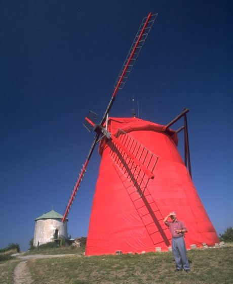 Die Windmühle von Retz (Niederösterreich) rot verpackt